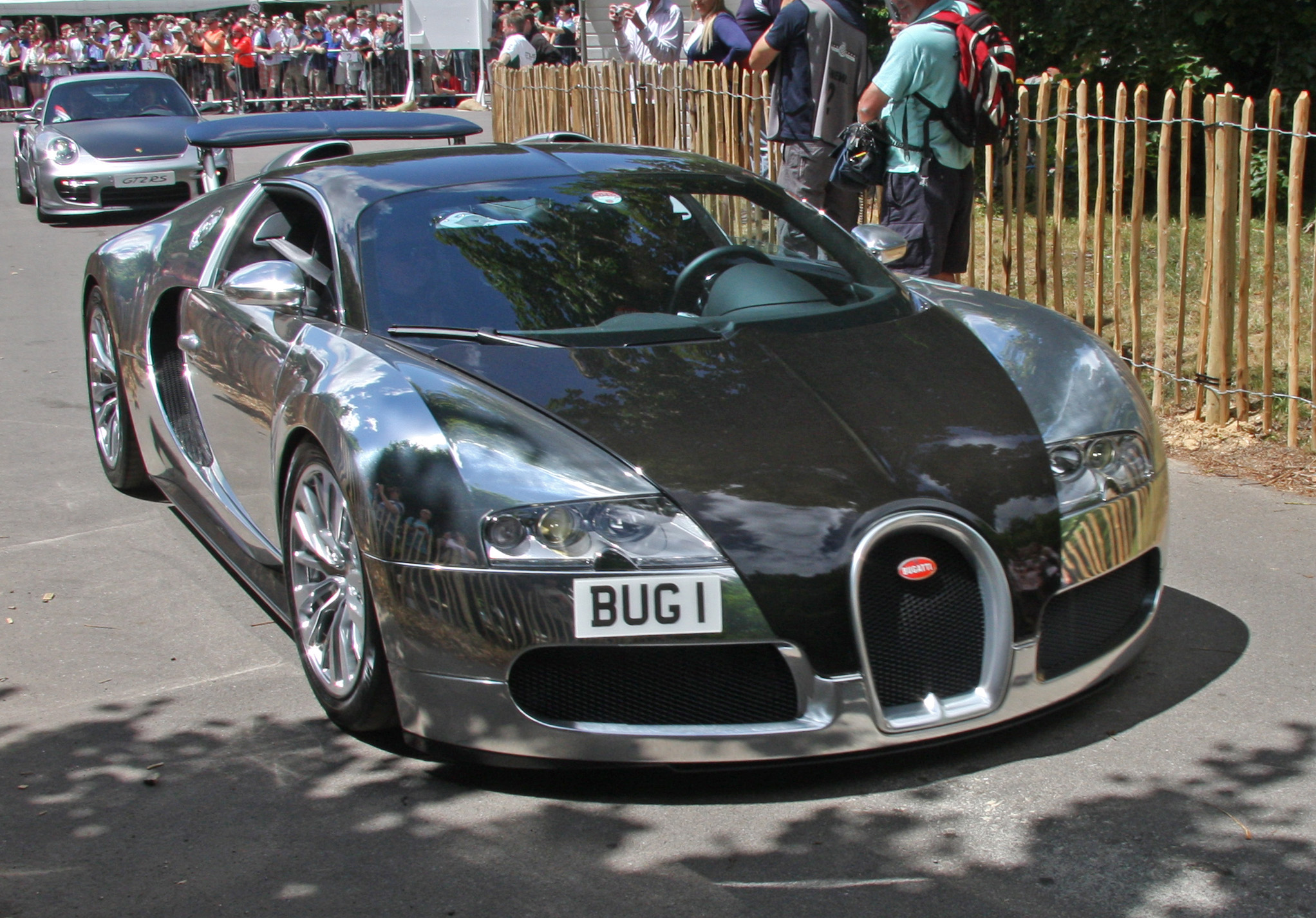 Bugatti Veyron